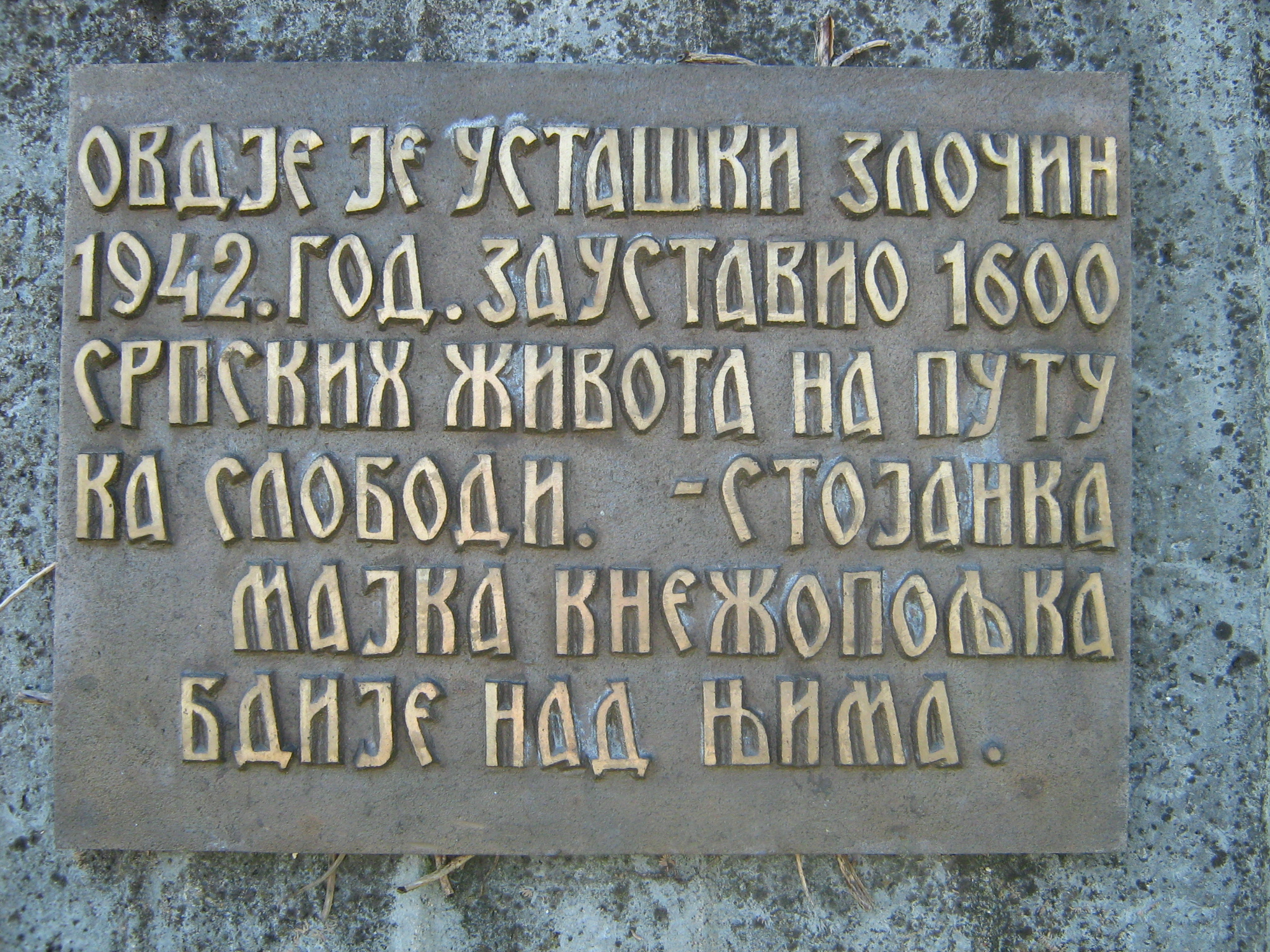 Ova spomen ploca se nalazi kod spomenika Stojanke majke Knezpoljske u Kozarskoj Dubici.